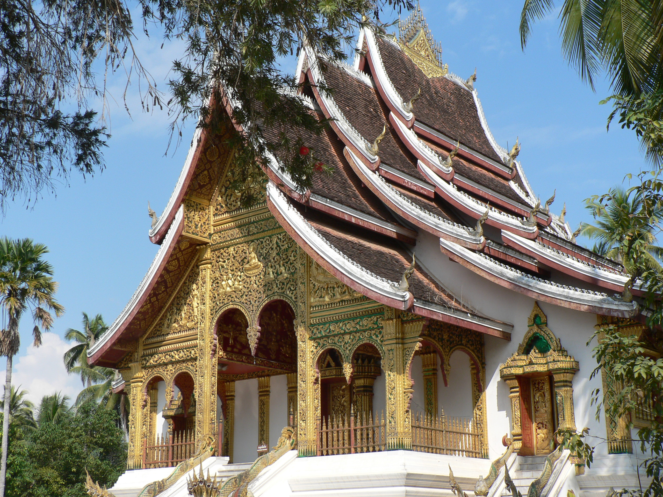 Buddhist temple at Royal Palace in Luang Prabang, Laos